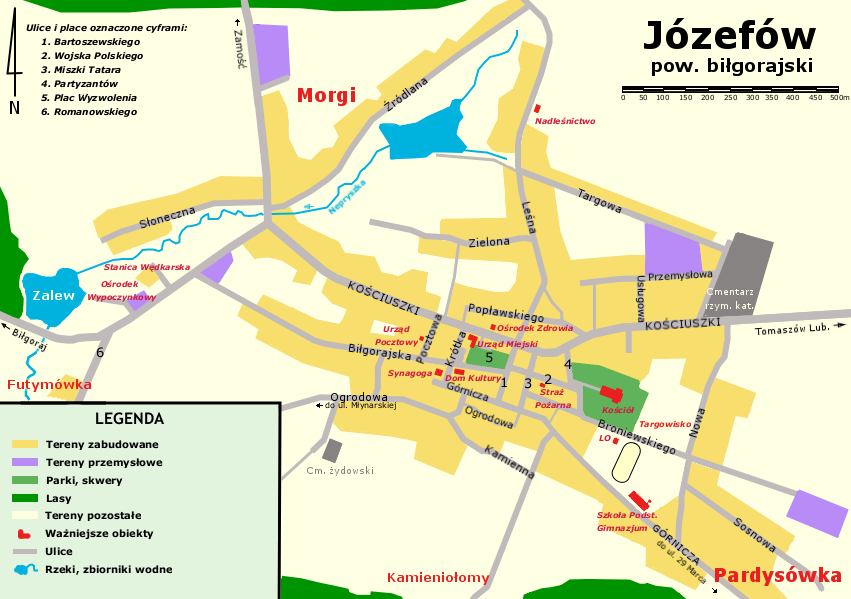 plan Józefowa (pow. Biłgoraj)